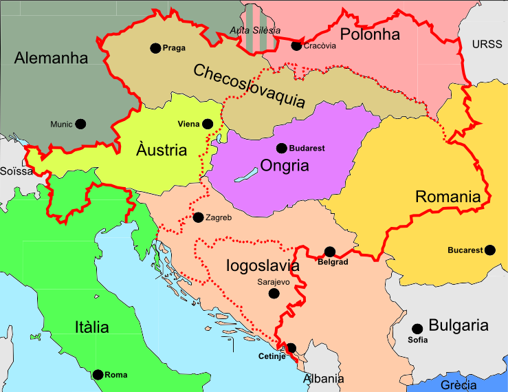 Partiment de l'Empèri d'Àustria-Ongria en 1918.